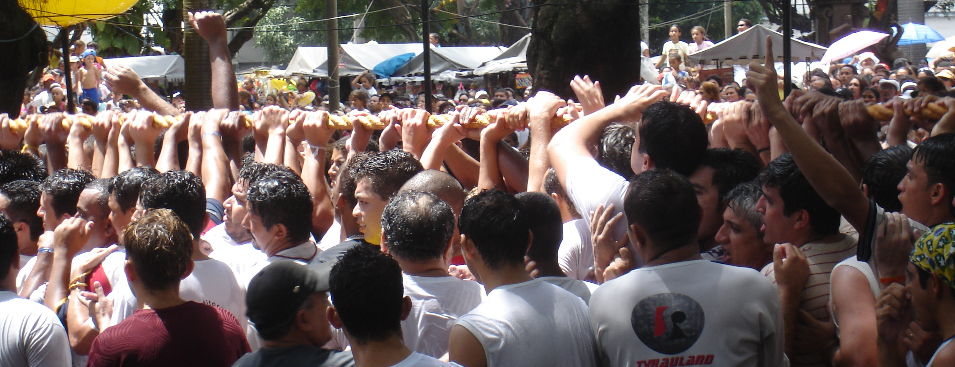 Our Lady of Nazareth’s Taper. Belém, Pará, Brazil / Círio de Nossa Senhora de Nazaré